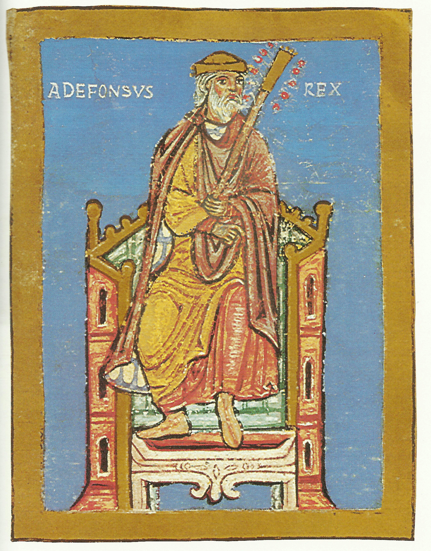 Miniatura do rei Afonso III o Magno, de Asturias (848-910), no Tumbo A da Catedral de Santiago de Compostela